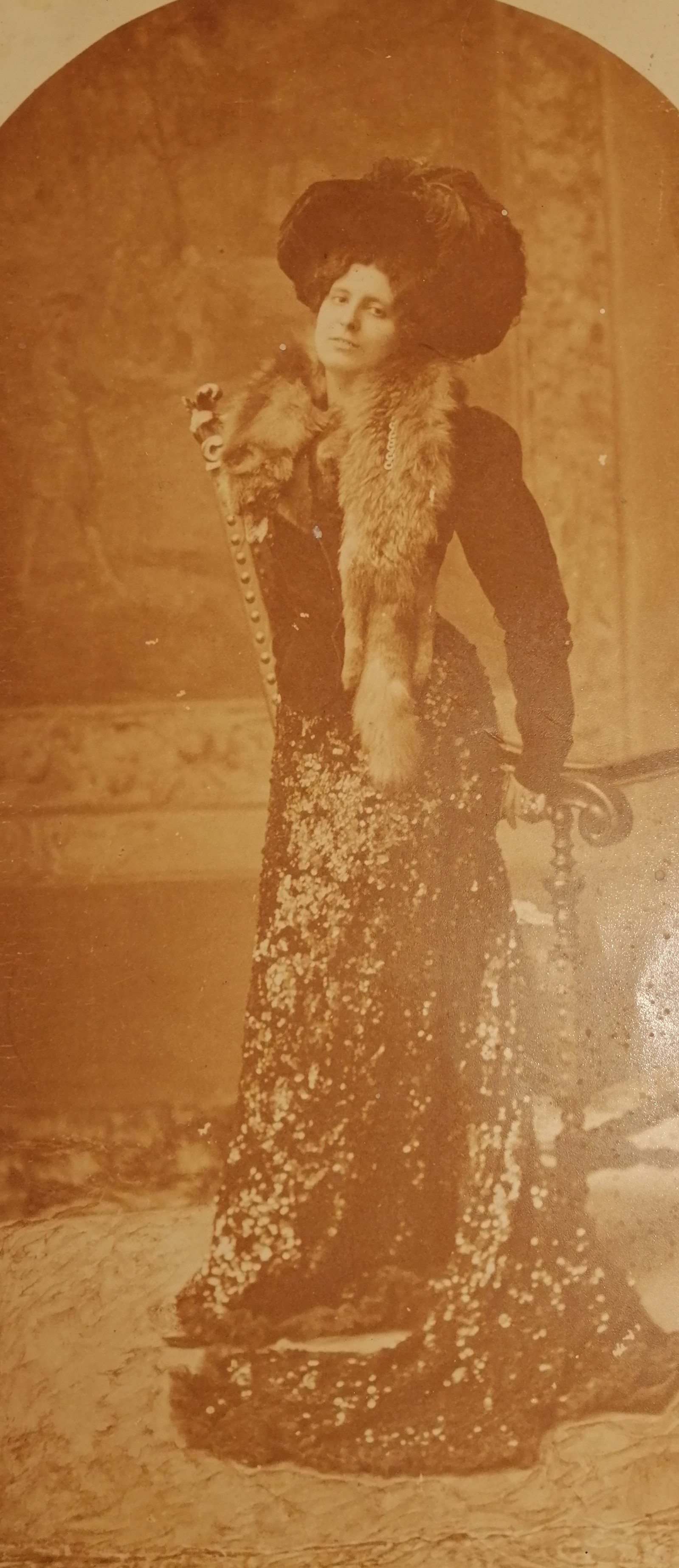 Angiola Maria Pagliano. Fotgrafia appartenente all'archivio Borgia